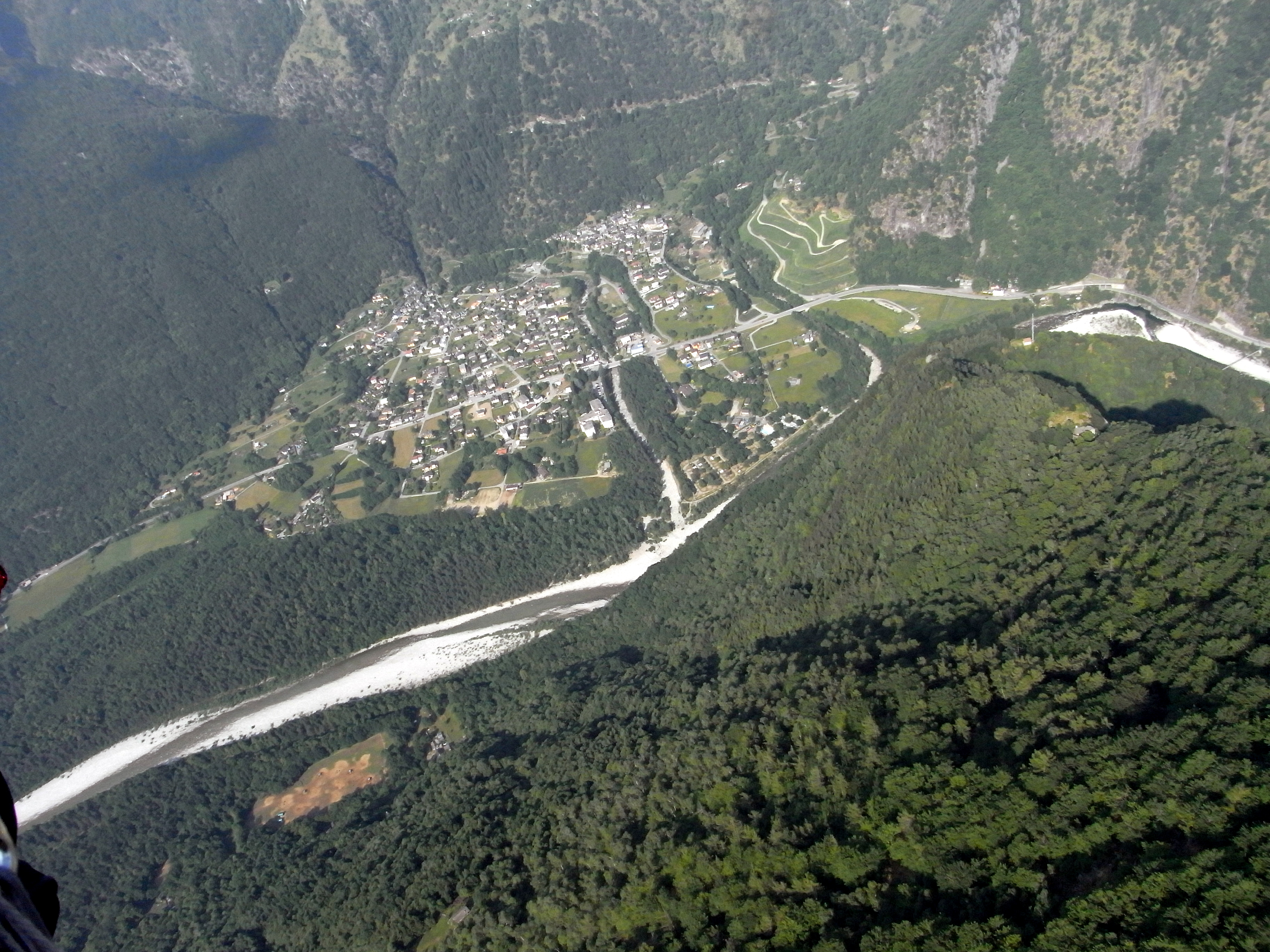 Gordevio